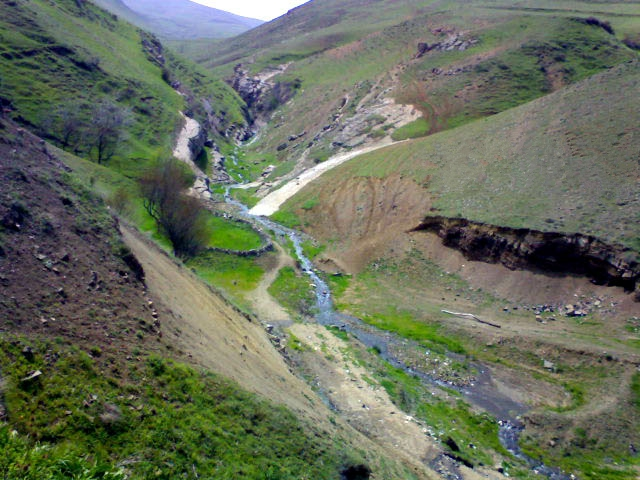 نمایی از رودخانه تولون در محل روستای تولون